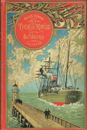 A Nyolcvan nap alatt a Föld körül című Jules Verne-regény 1896-os francia kiadásának könyvborítója.